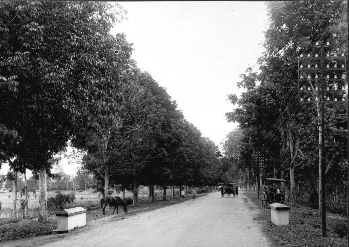 Foto. De grote weg tussen Ampenan en Mataram op het eiland Lombok.